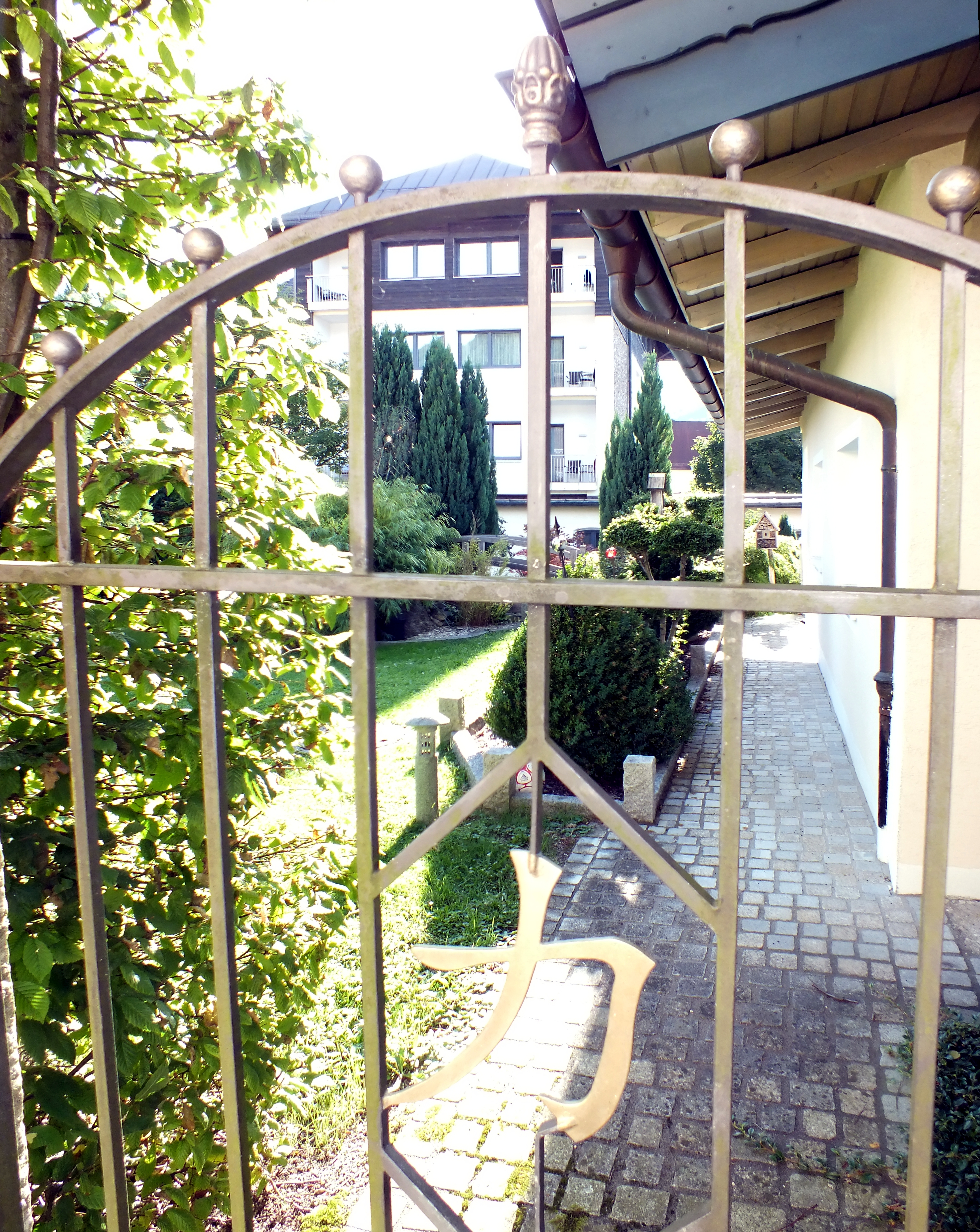 Baudenkmal in Ruhpolding, Hauptstr.; Zengarten